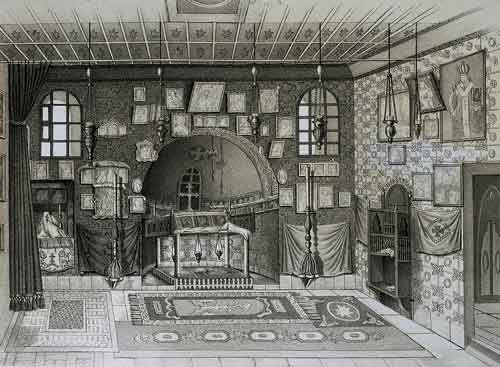 Chapel of the Burning Bush in Saint Catherine's Monastery, Mount Sinai (Литография рисунка часовни Неопалимой купины (Синай) из из альбома архимандрита Порфирия Успенского)